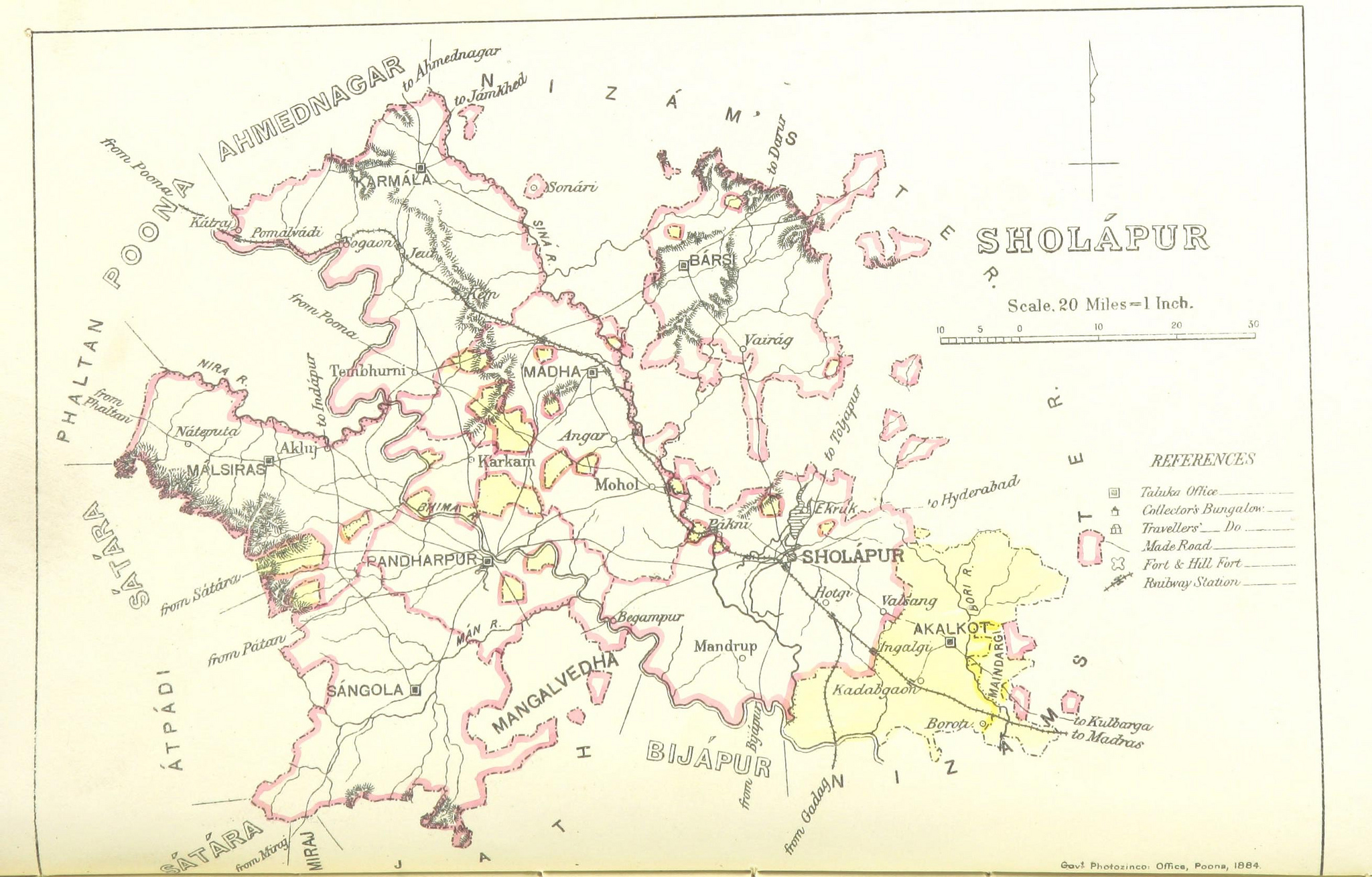 Solapur district 1896